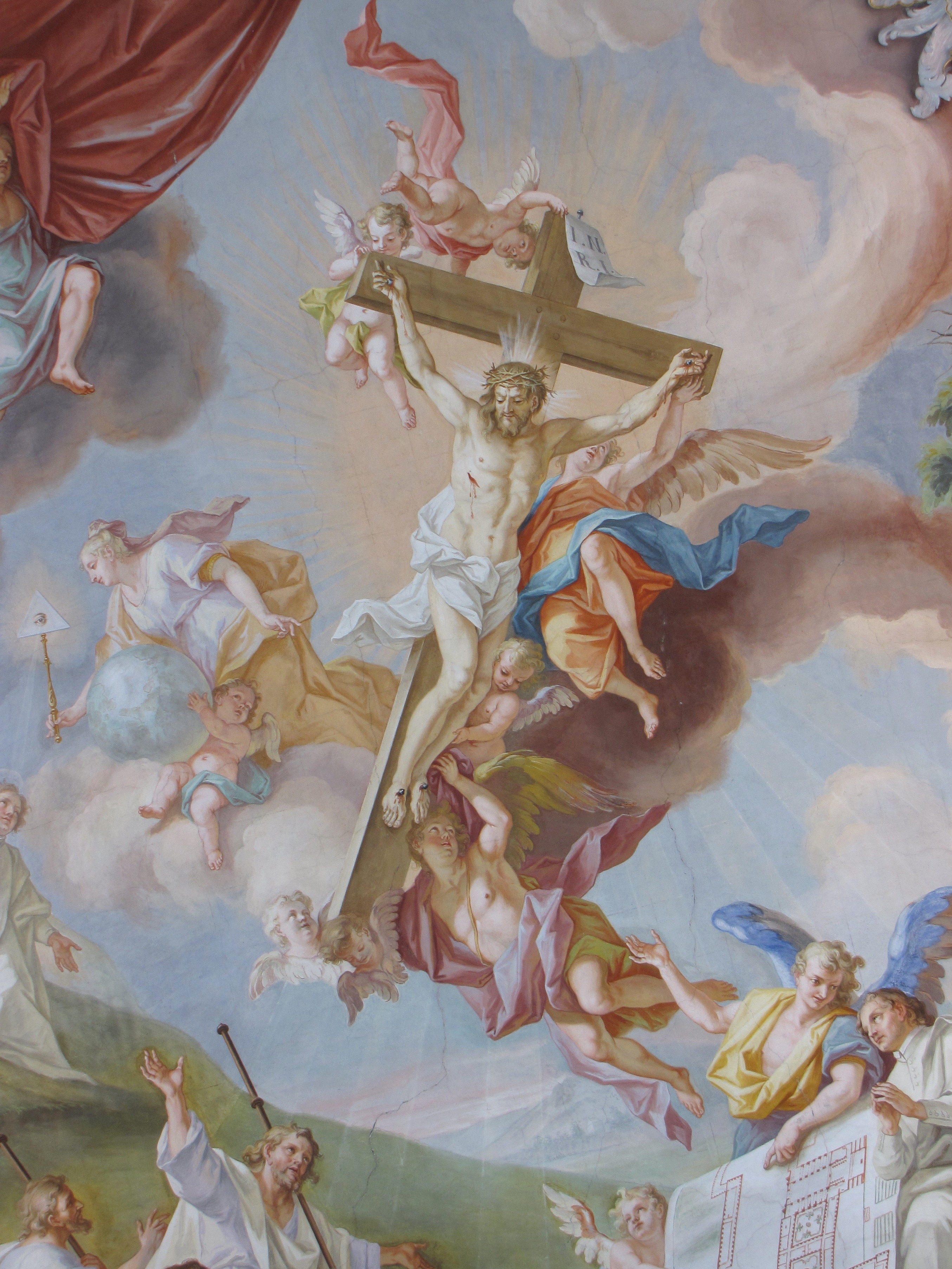 Deckenbild in der Pfarrkirche Steingaden von Johann Georg Bergmüller (Detail)